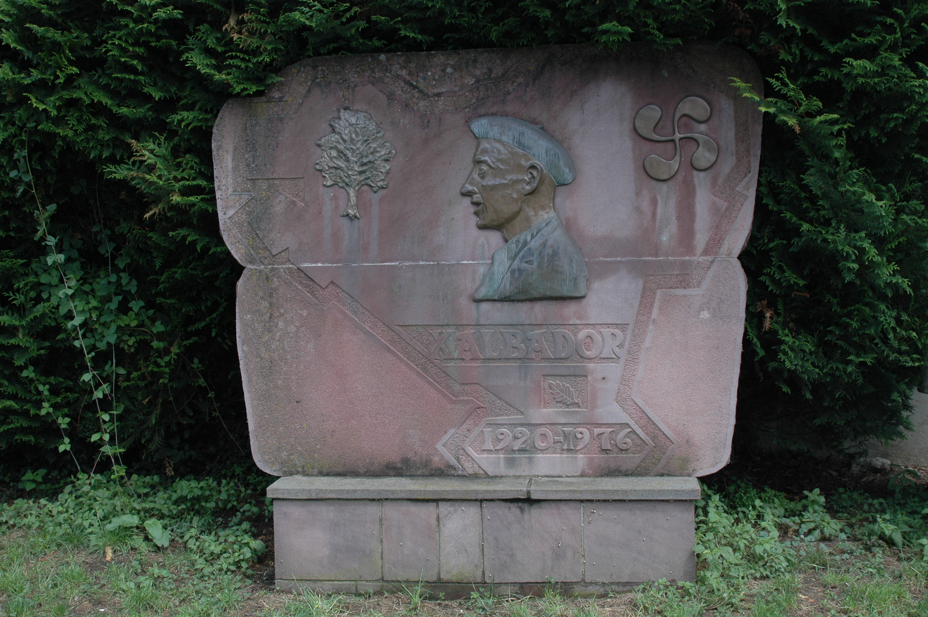 Urepel, hommage au bertsulari Xalbador